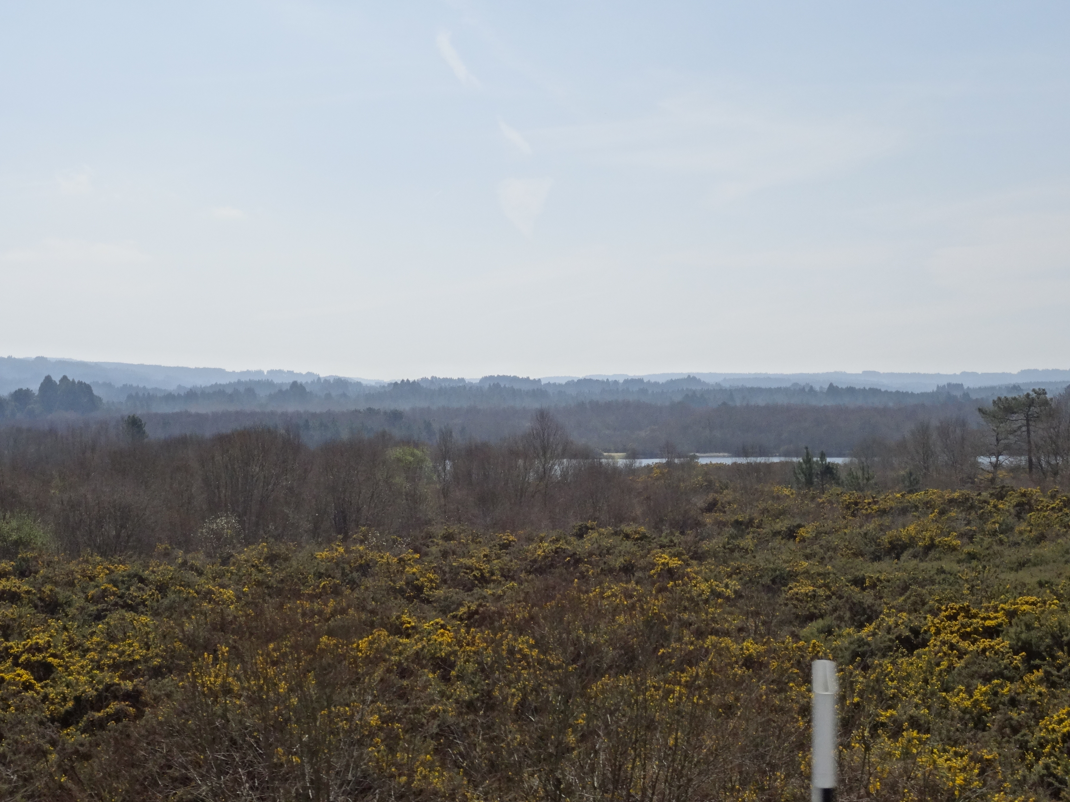 Lagoas do Pedroso dende a A-6.